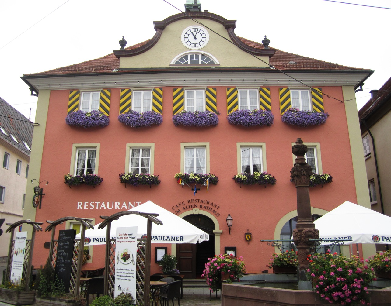 Oberndorf am Neckar, Altes Rathaus